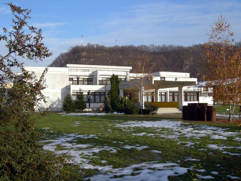 Srednja skola "Mihailo Petrović Alas" u Ugljeviku